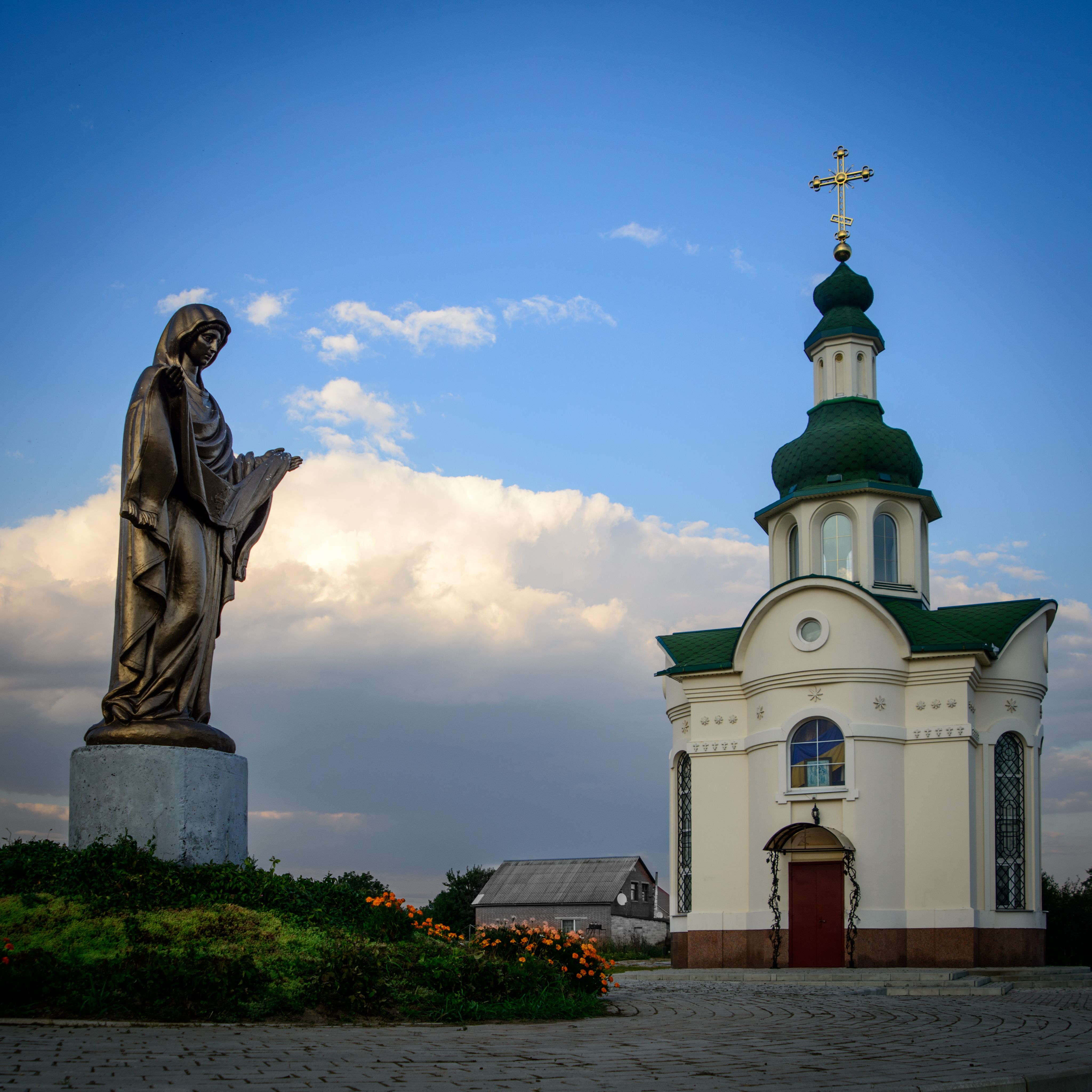 Меморіальний комплекс пам’яті загиблих козаків:, с. Жуки, центр